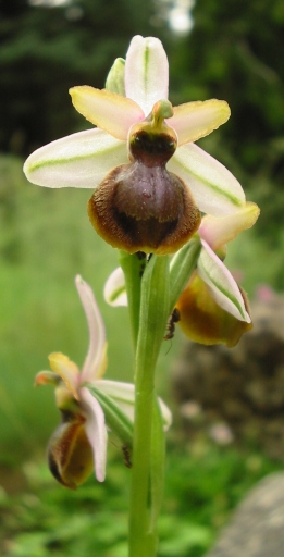 Ophrys aveyronensis, Jardin alpin, Jardin des Plantes de Paris